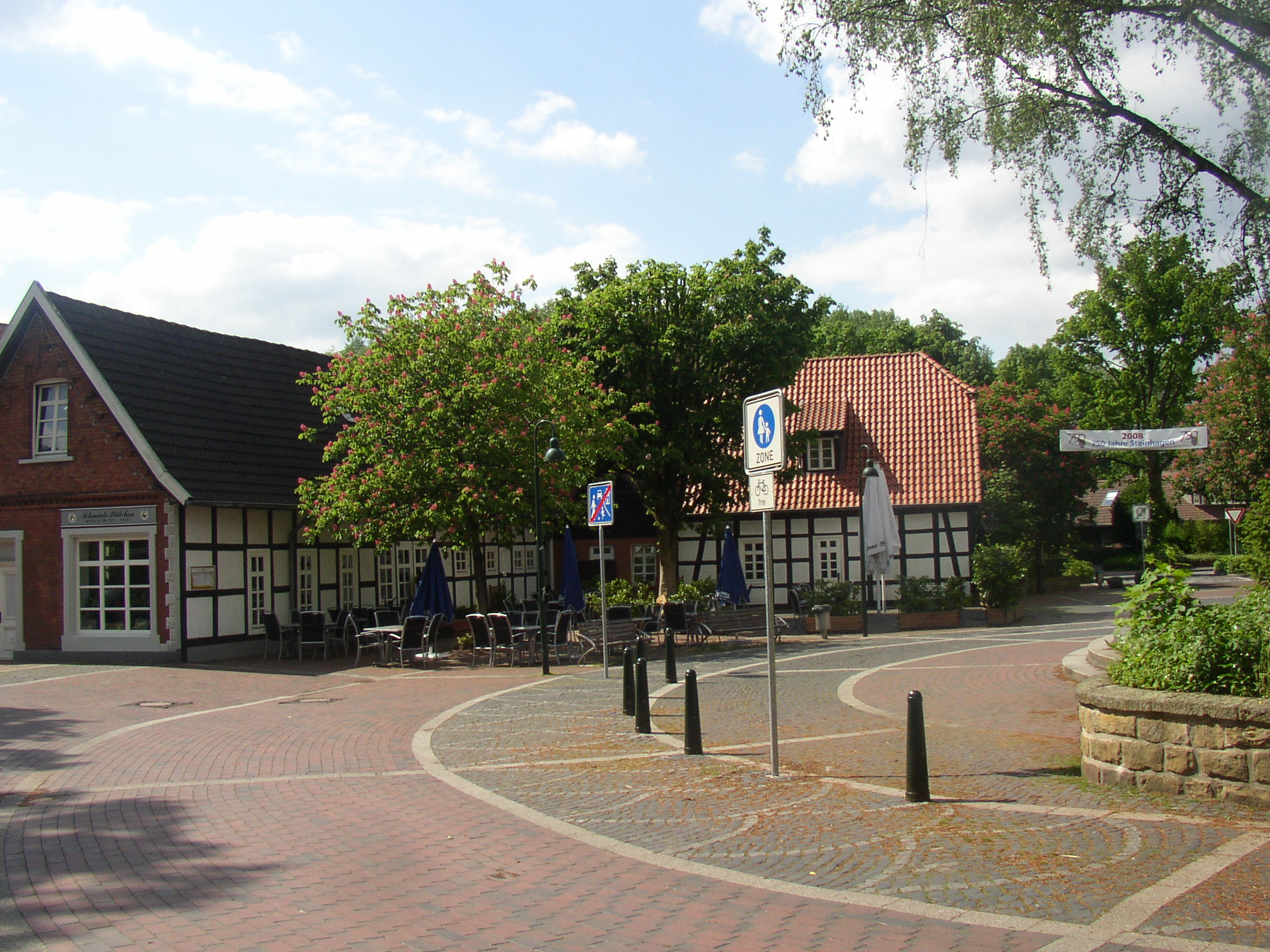 Steinhagen - Am Kirchring, Germany